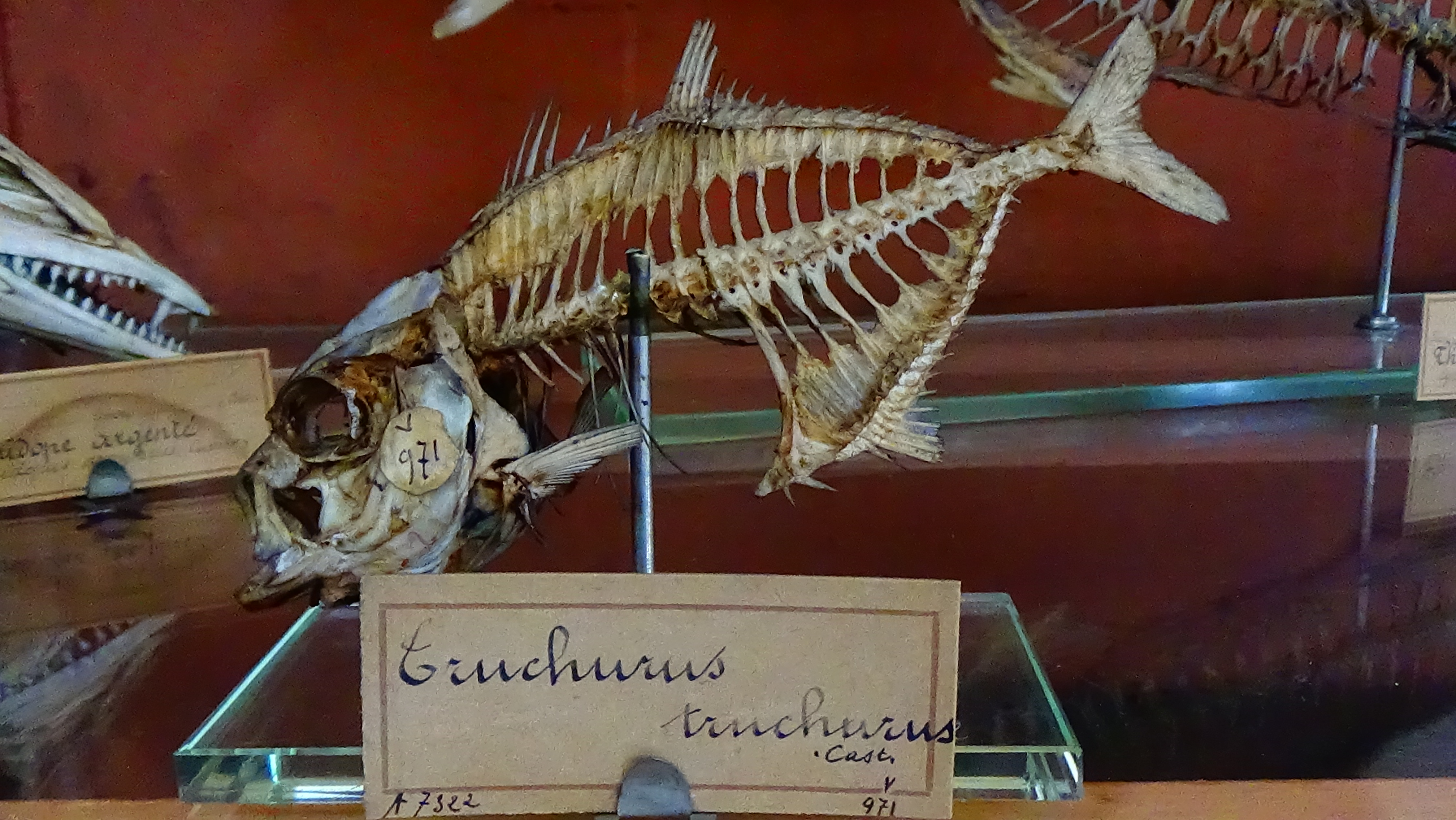 Trachurus trachurus - (Truchurus truchurus) - squelette mnhn Paris